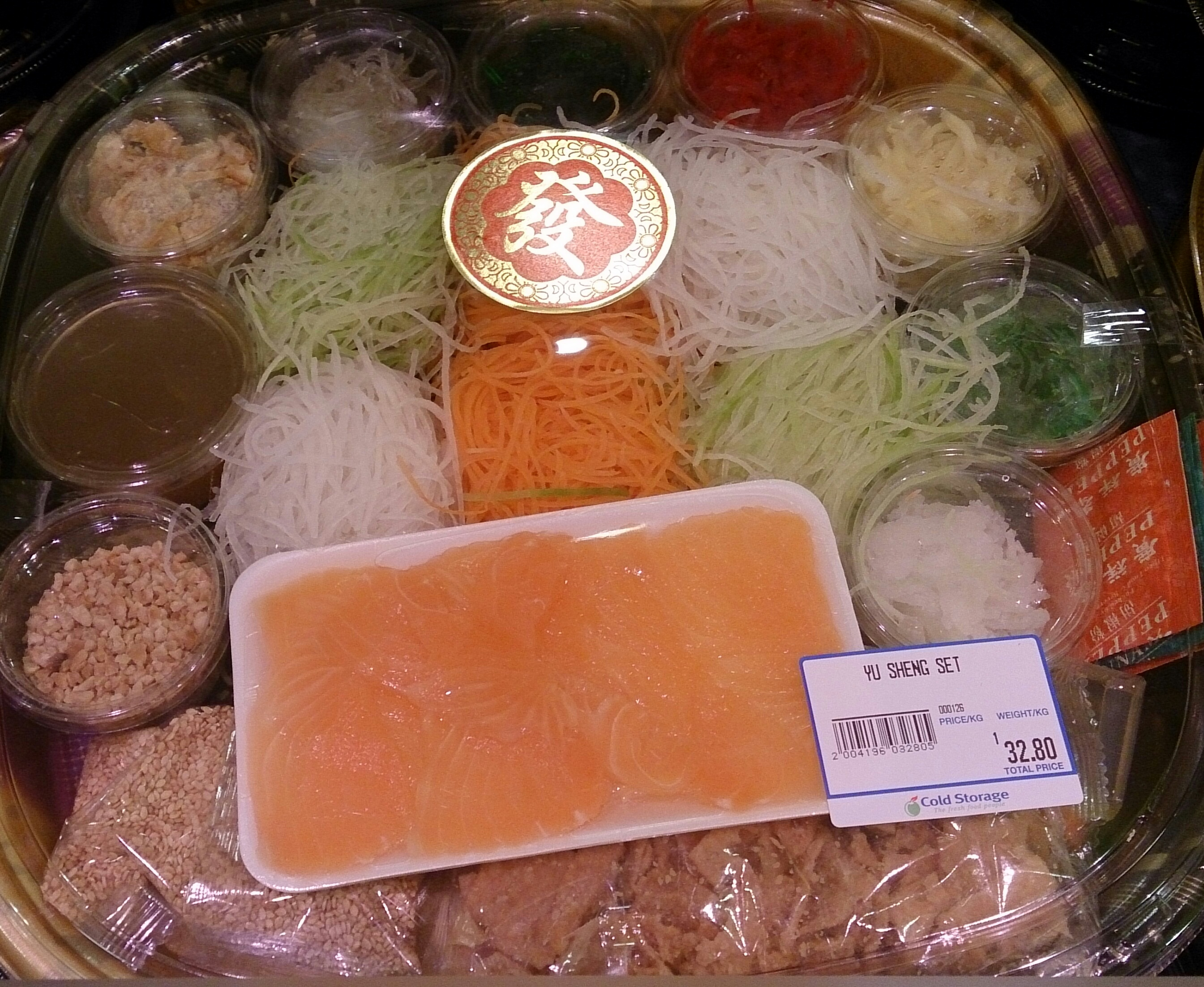 aka lohei